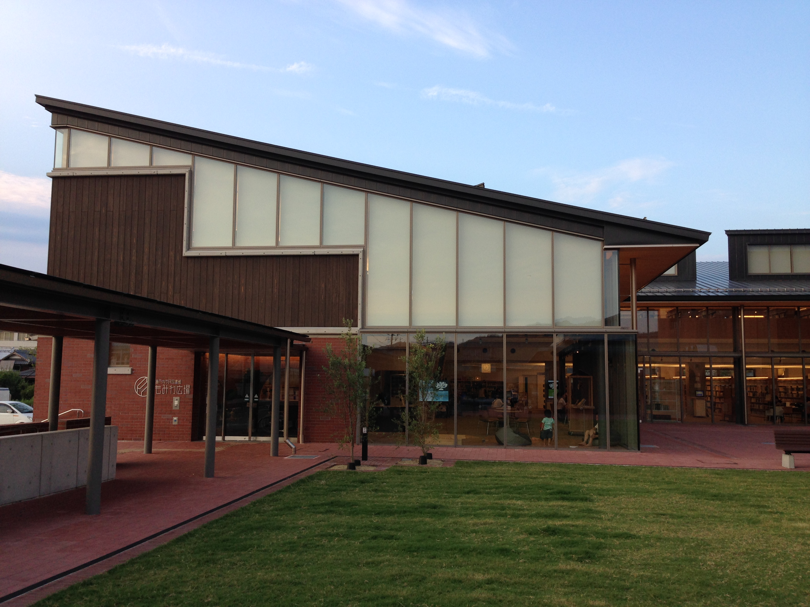 瀬戸内市民図書館もみわ広場（岡山県瀬戸内市）